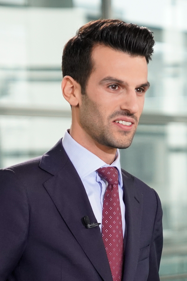 St. Poelten, Oesterreich, 21.01.2018, Politik, Landtagswahlen Niederoesterreich - ORF-Diskussion der Spitzenkandidaten im Landhaus. Bild zeigt Spitzenkandidat der FPÖ Udo Landbauer.